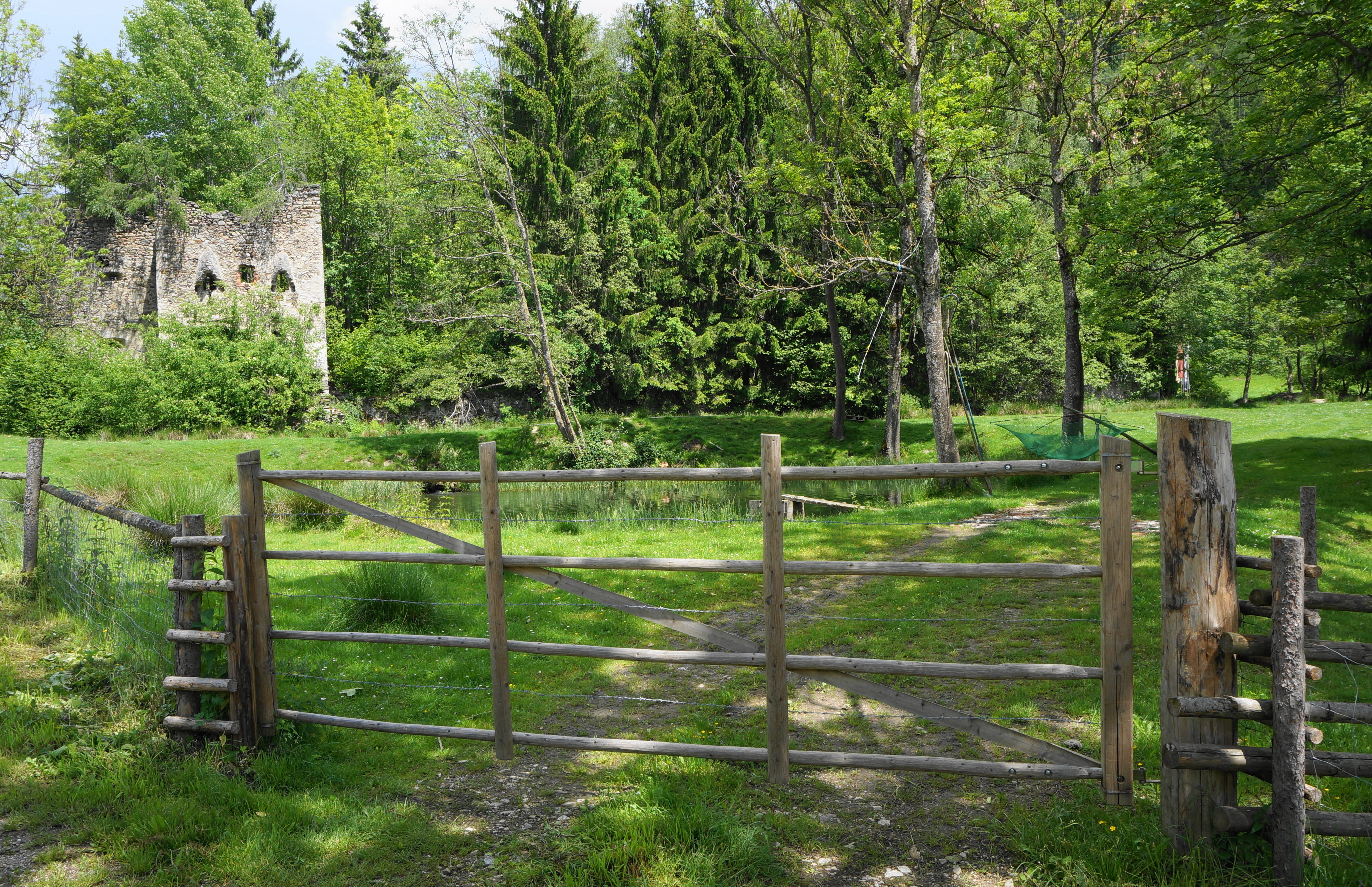 Burgruine Painburg (Teufenbach) unweit des Schlosses Lichtengraben in Bad Sankt Leonhard im Bezirk Wolfsberg, Kärnten, Österreich, Europäische Union aus dem 15. Jhd. Für Wohnzwecke errichtet von den Handelsleuten der "Pains" aus Judenburg und Besitzer der Gold- und Silbergewerke im Oberen Lavanttal